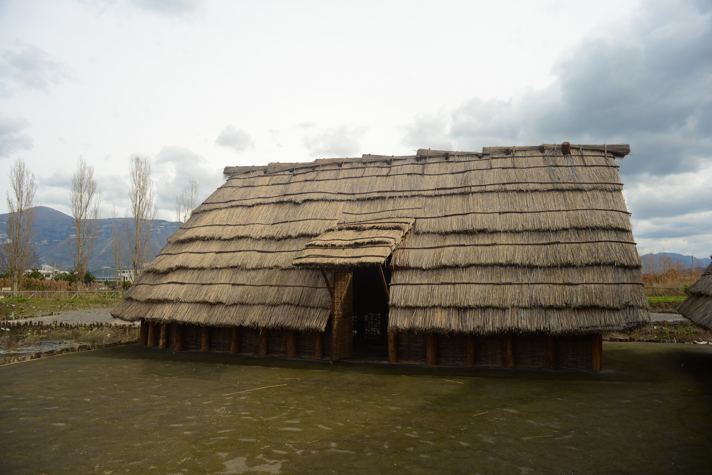 Parco archeologico del sito archeo-fluviale di Longola. Capanne del villaggio preistorico